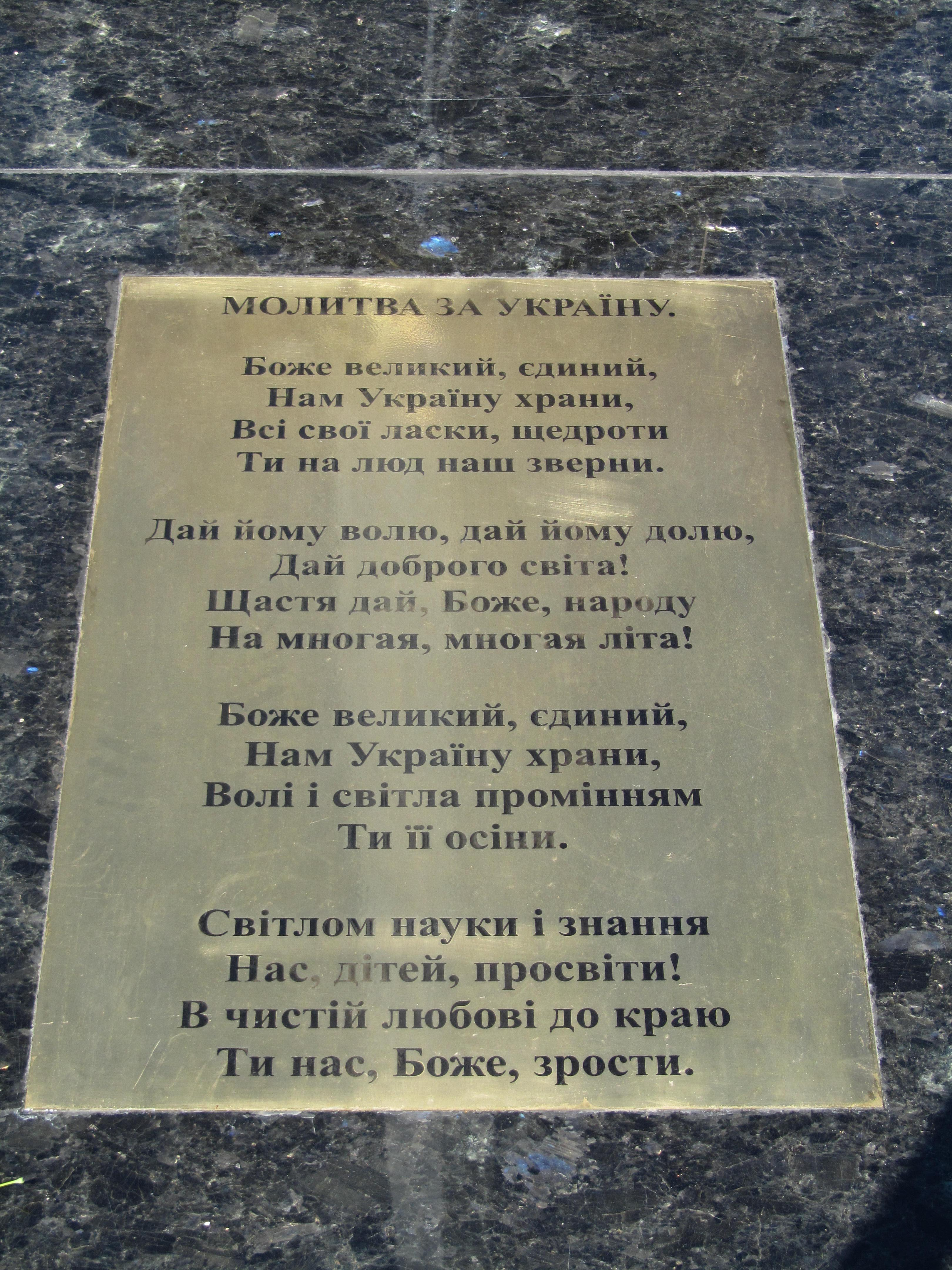 Зміїв, державний прапор України - Молитва за Україну